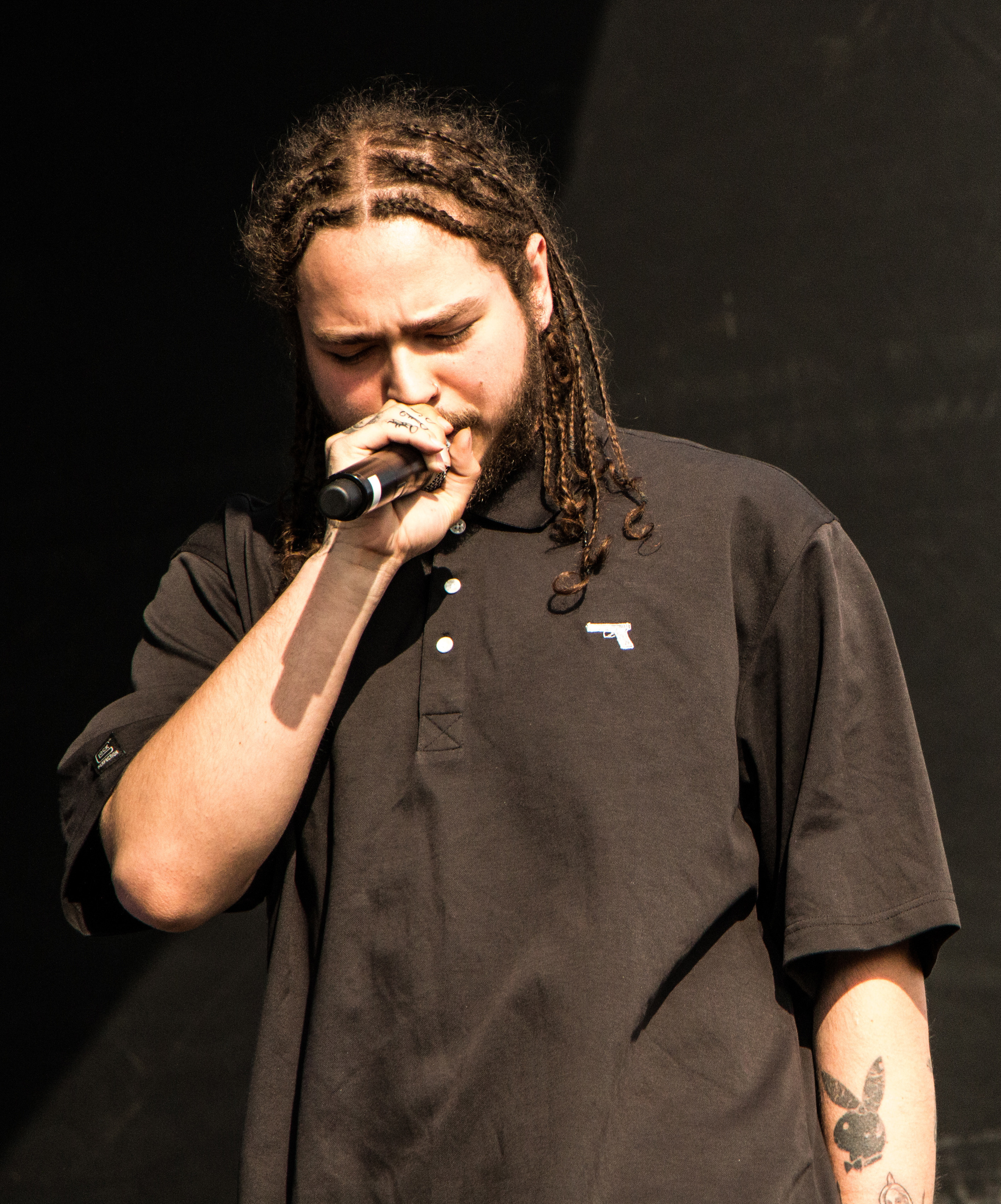 VELD 2016